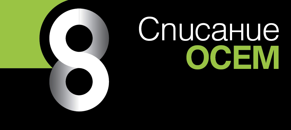 Логото на Списание 8